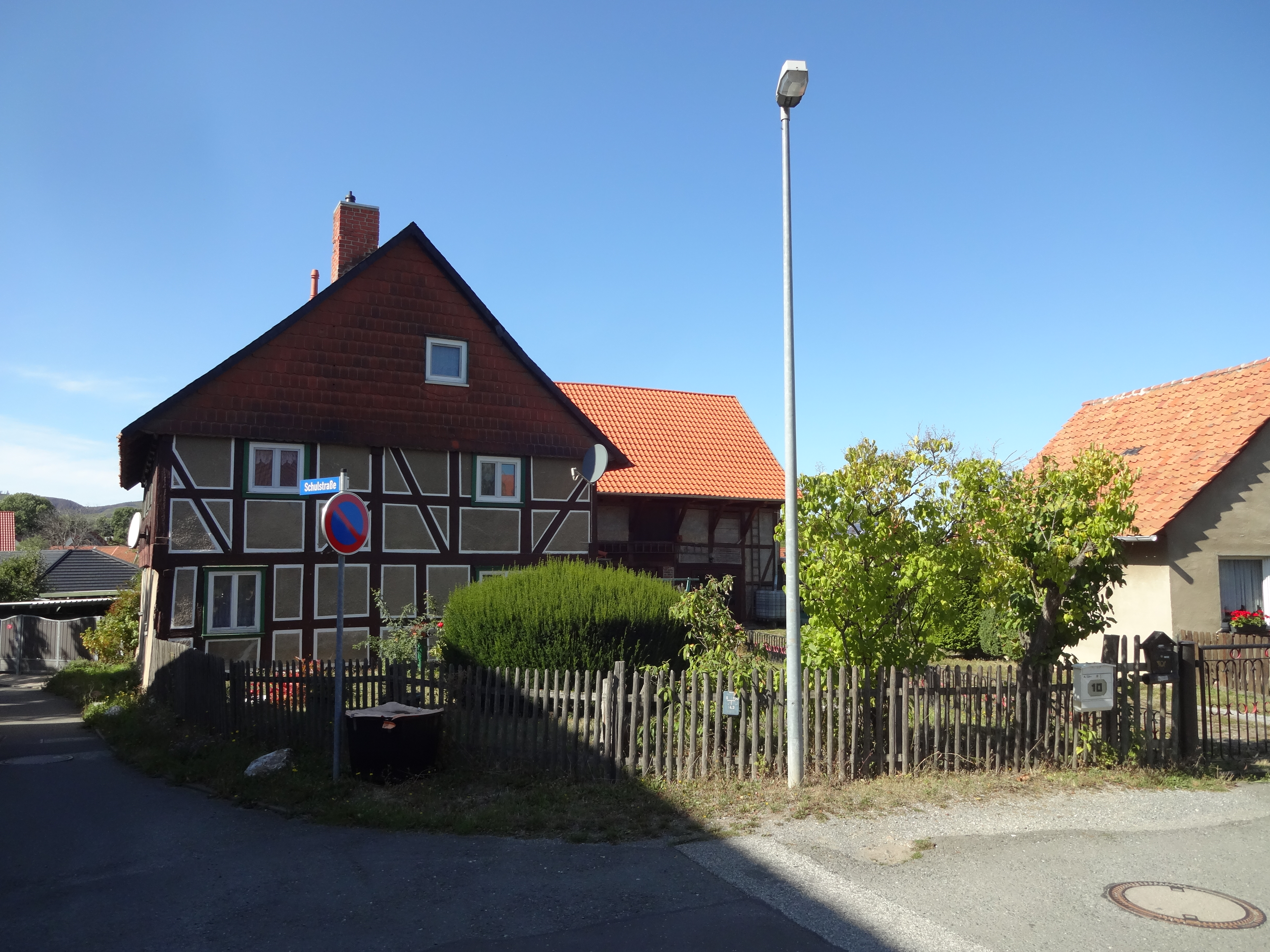 denkmalgeschütztes Bauernhaus im Mühlenwinkel 10 in Drübeck